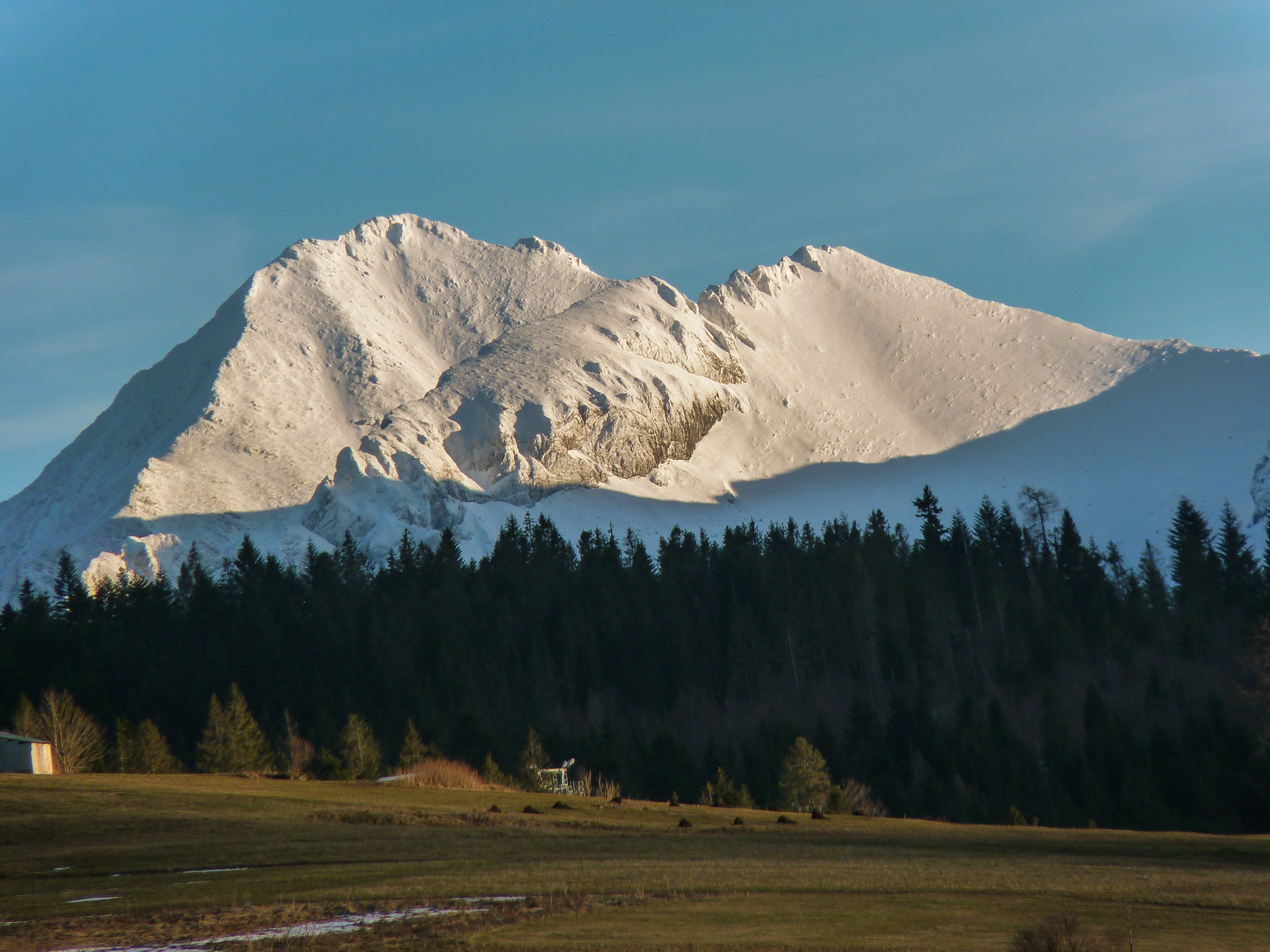 Zdjęcie wykonane 25 grudnia 2017 roku przedstawiające widok na Hawrań z polany Zgorzelisko